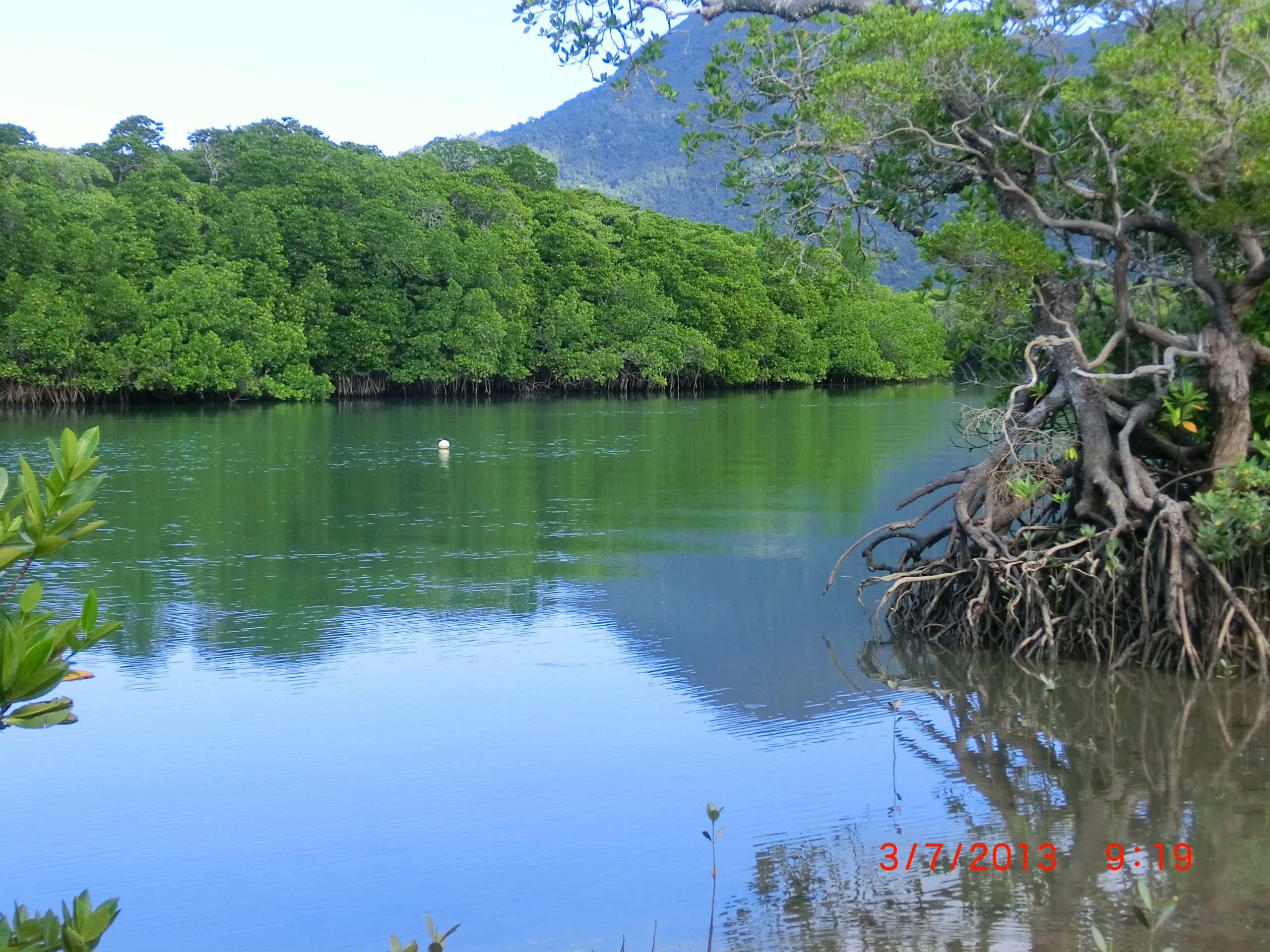 Diwan QLD 4873, Australia